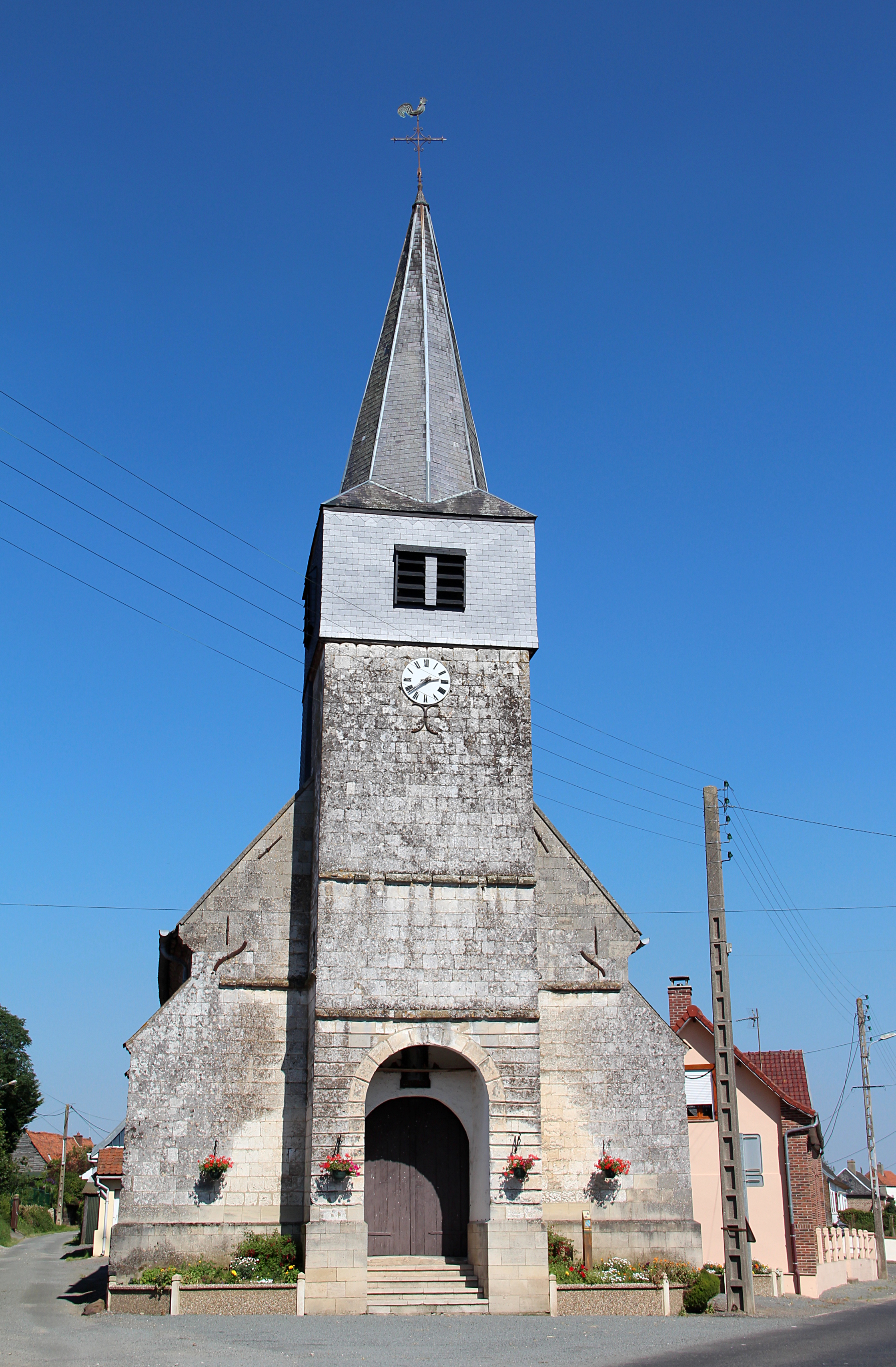 Le Ponchel (Pas-de-Calais) - France, l'église du village.